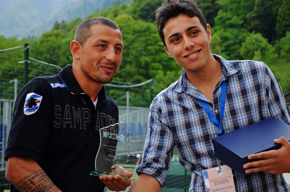 Angelo Palombo riceve un premio dalla redazione di SampNews 24. A consegnarlo è Flavio Morrone.